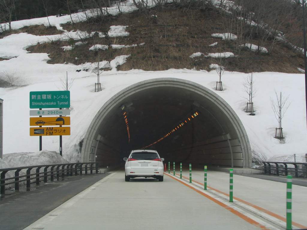 主寝坂道路 新主寝坂トンネル（山形側抗口）